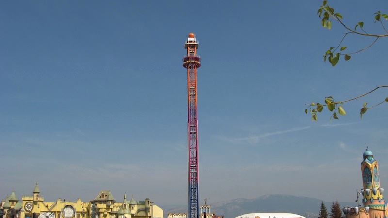 Mystica a Rainbow Magicland